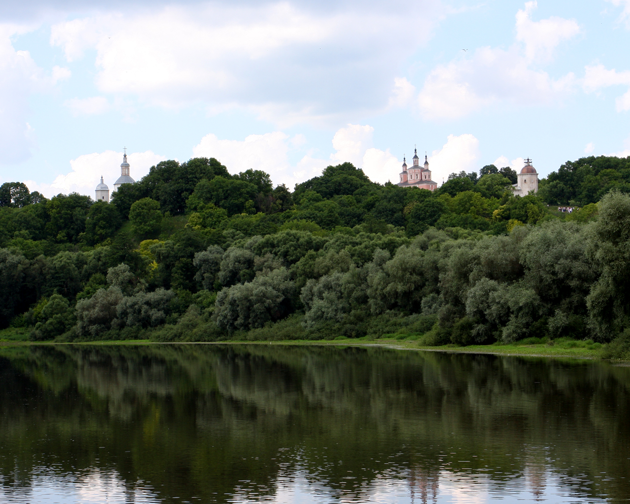 Ансамбль Свенского Успенского монастыря (Брянская область, Брянск, посёлок Супонево)